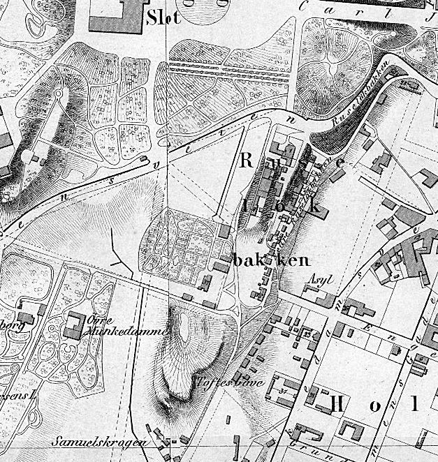 Kart over Ruseløkkbakken, 1861.